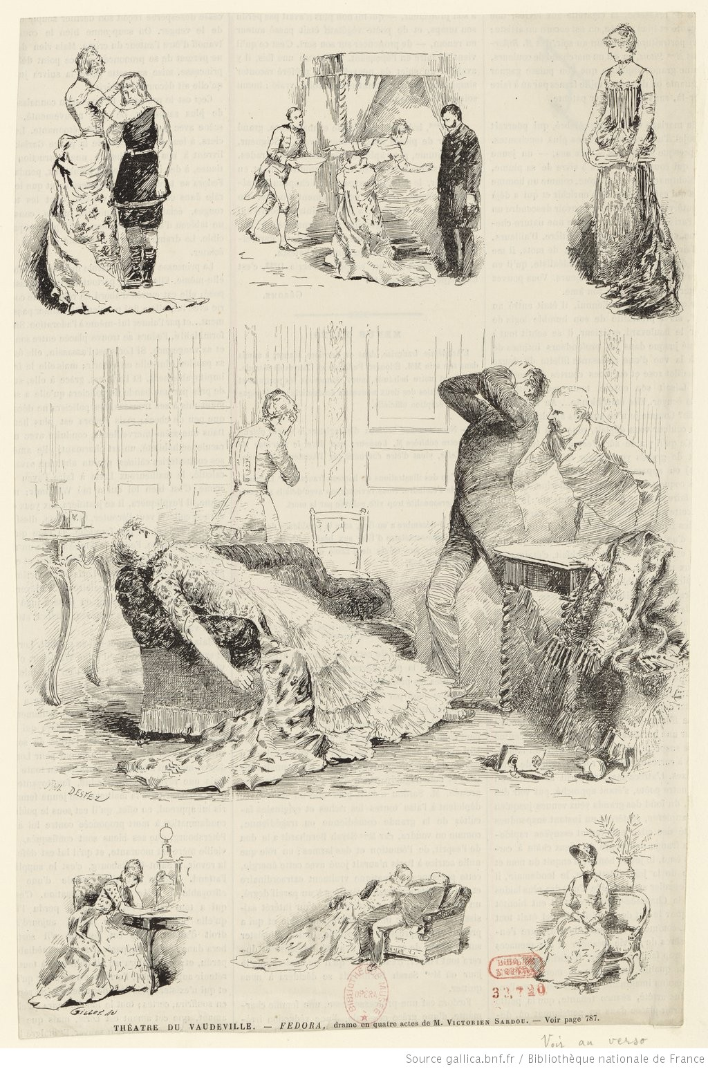 Fédora, drame de Victorien Sardou, Théâtre du Vaudeville, 11 décembre 1882 (estampes de Charles Gillot et Paul Destez)